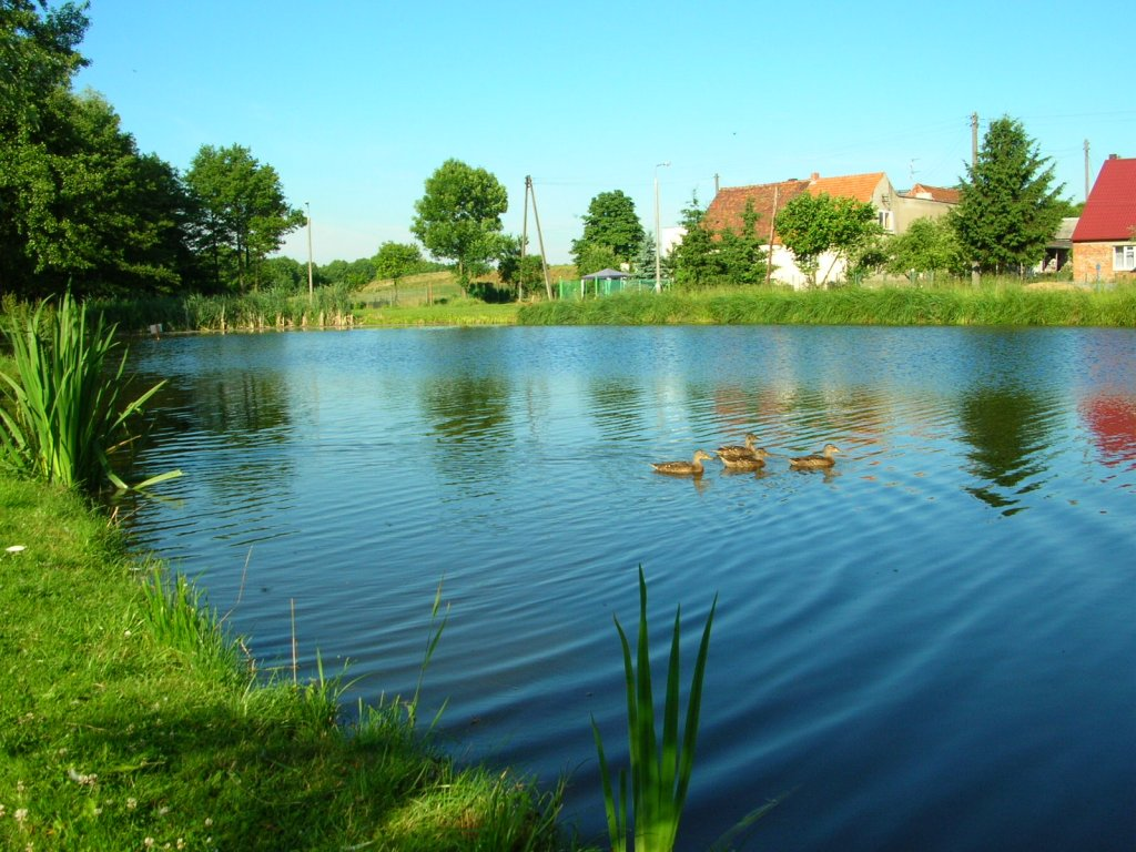 Struga Lisi Ogon - staw na Prądach w Bydgoszczy